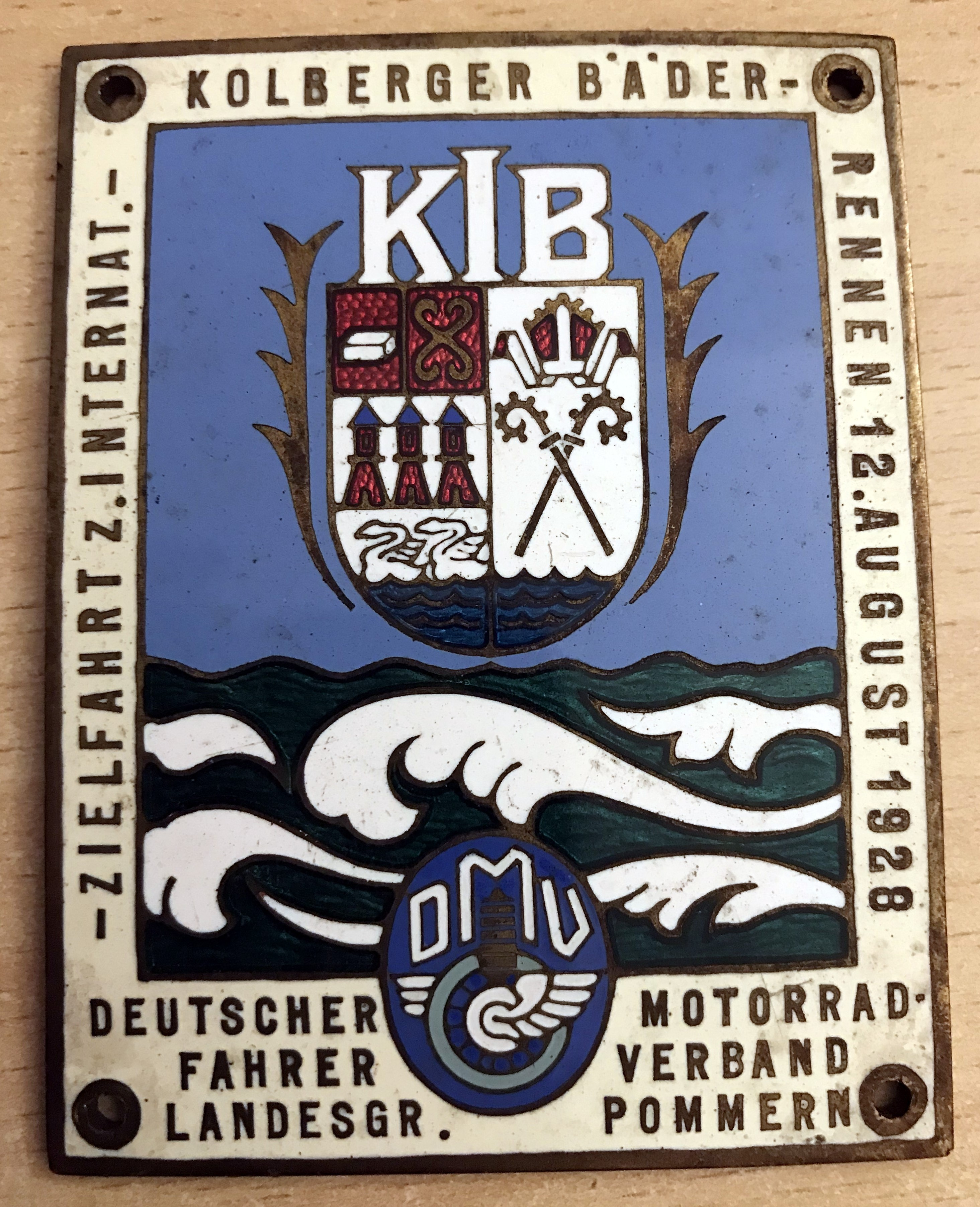 Plakette Rennen Kolbeger Bäder 12. August 1928